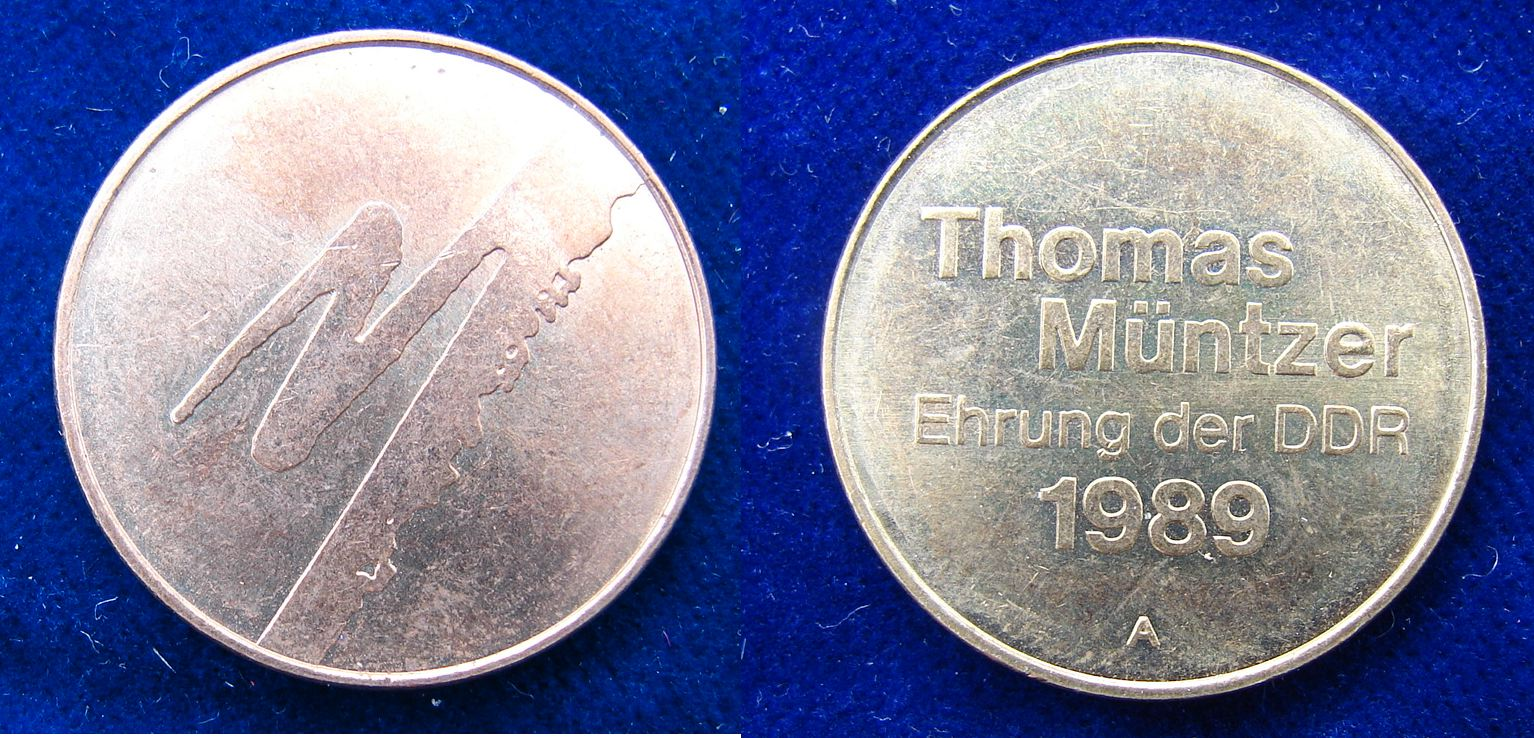 Medallion Cu/Ni D.= 26 mm Müntzer, Thomas, Reformation Theologist, 1489 Stolberg -1525 Mühlhausen (Thüringen), Germany. Monogramm "M"/ 5 Z: Thomas Müntzer Ehrung der DDR 1989 A". "A" was the mint mark of the East German mint Berlin. Condition: UNCIRCULATED MS 63.